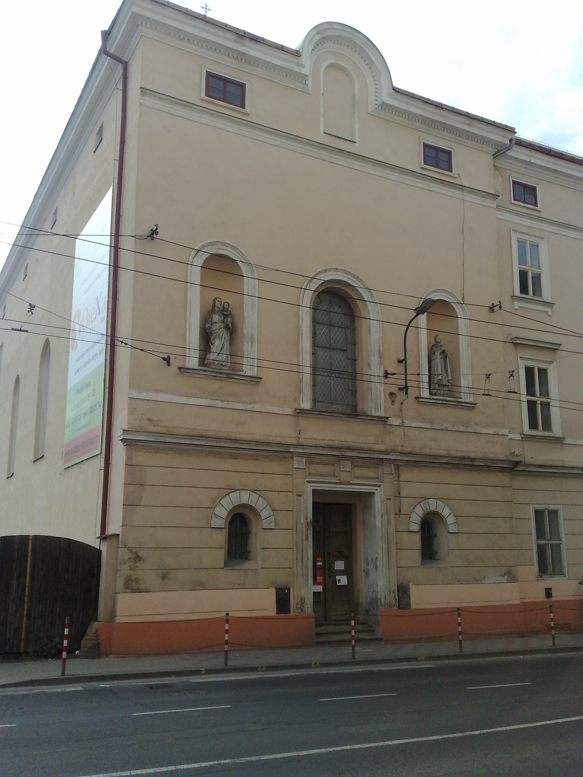 Beuronská kaple u Gymnázia, právě probíhá výběrové řízení na její rekonstrukci, od ledna 2017 je veřejnosti uzavřená.